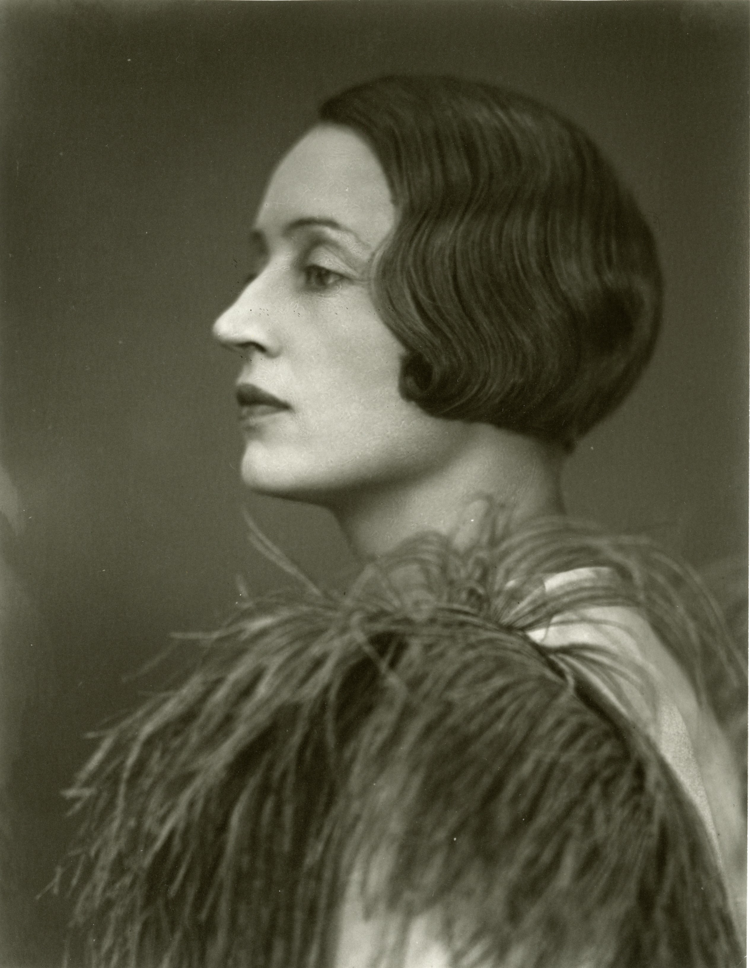 Besse Giersing, Fotograf Thomas Pedersen, 1933. Poul Pedersens Samling, Aarhus Stadsarkiv